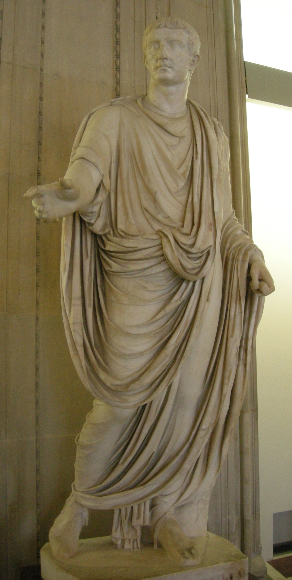 Imperatore tiberio da collezione vaticana.JPG